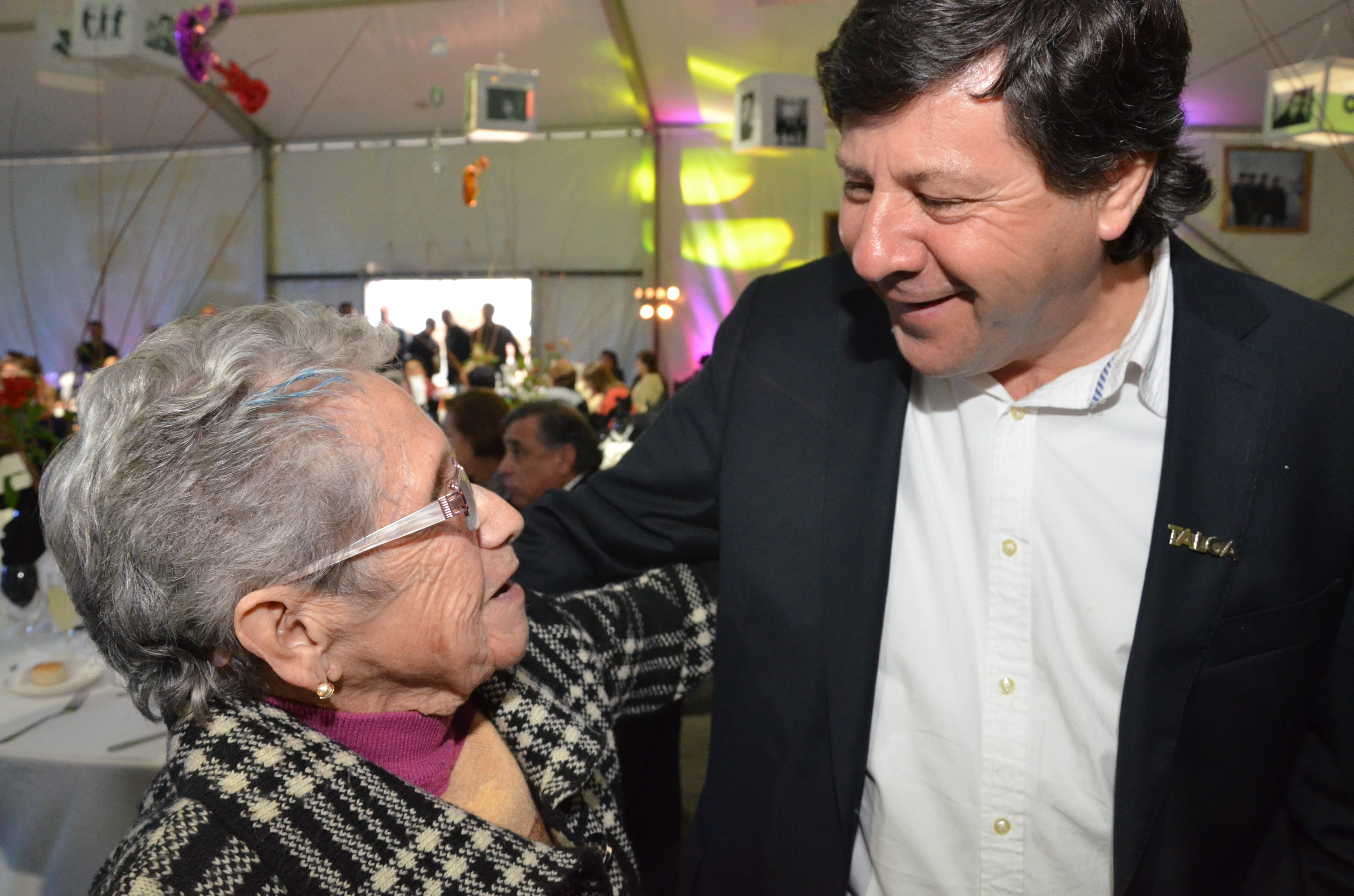 Juan Castro Prieto, Talca.